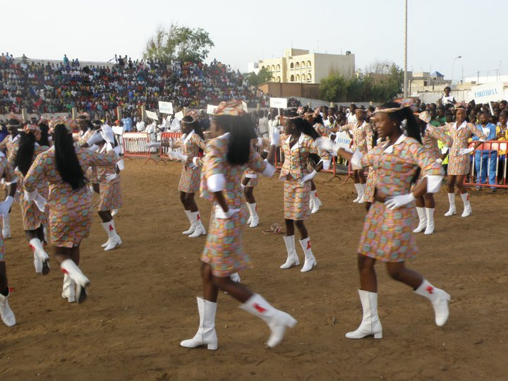 Jeunes filles des Parcelles Assainies